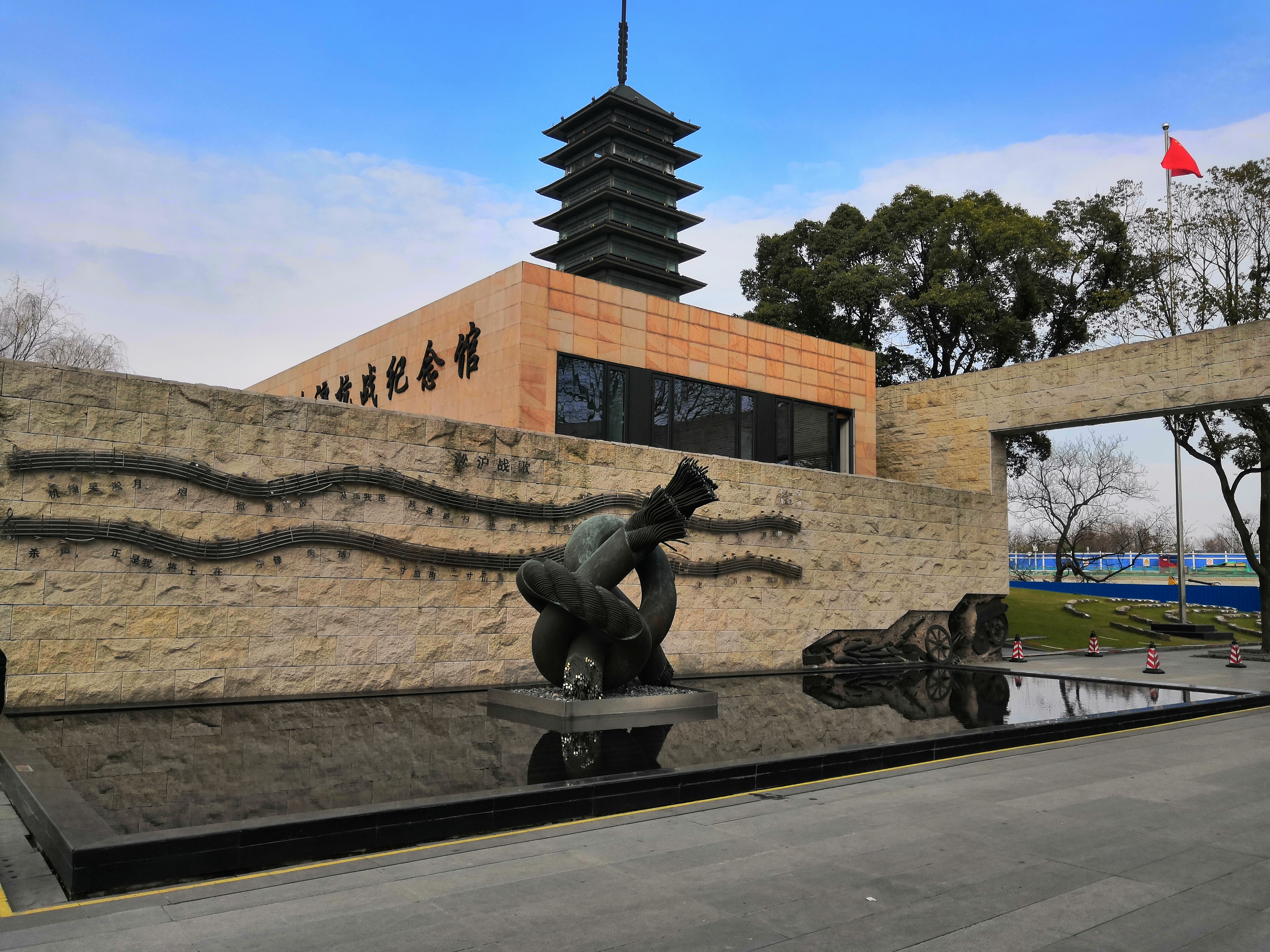 上海淞沪抗战纪念馆主体建筑，馆塔合一。图中有一个立体雕塑和一座浮雕。 立体雕塑《结1937》：余积勇创作，上海海平面艺术品有限公司负责设计。 浮雕《抗战遗迹》：上海海平面艺术品有限公司负责设计。